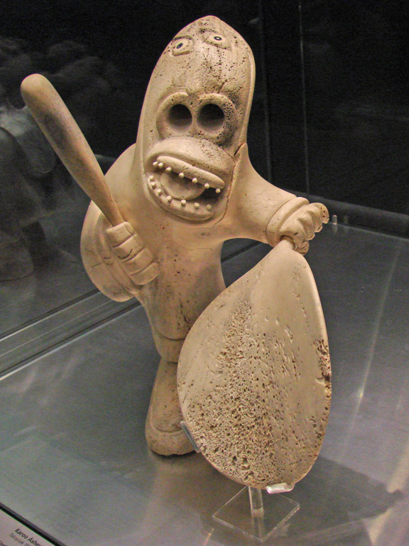 Joueur de tambour (1973) Sculpture de Karoo Ashevak (1940-1974) matériaux : os de baleine, ivoire, substance noire Musée des Beaux-arts de Montréal